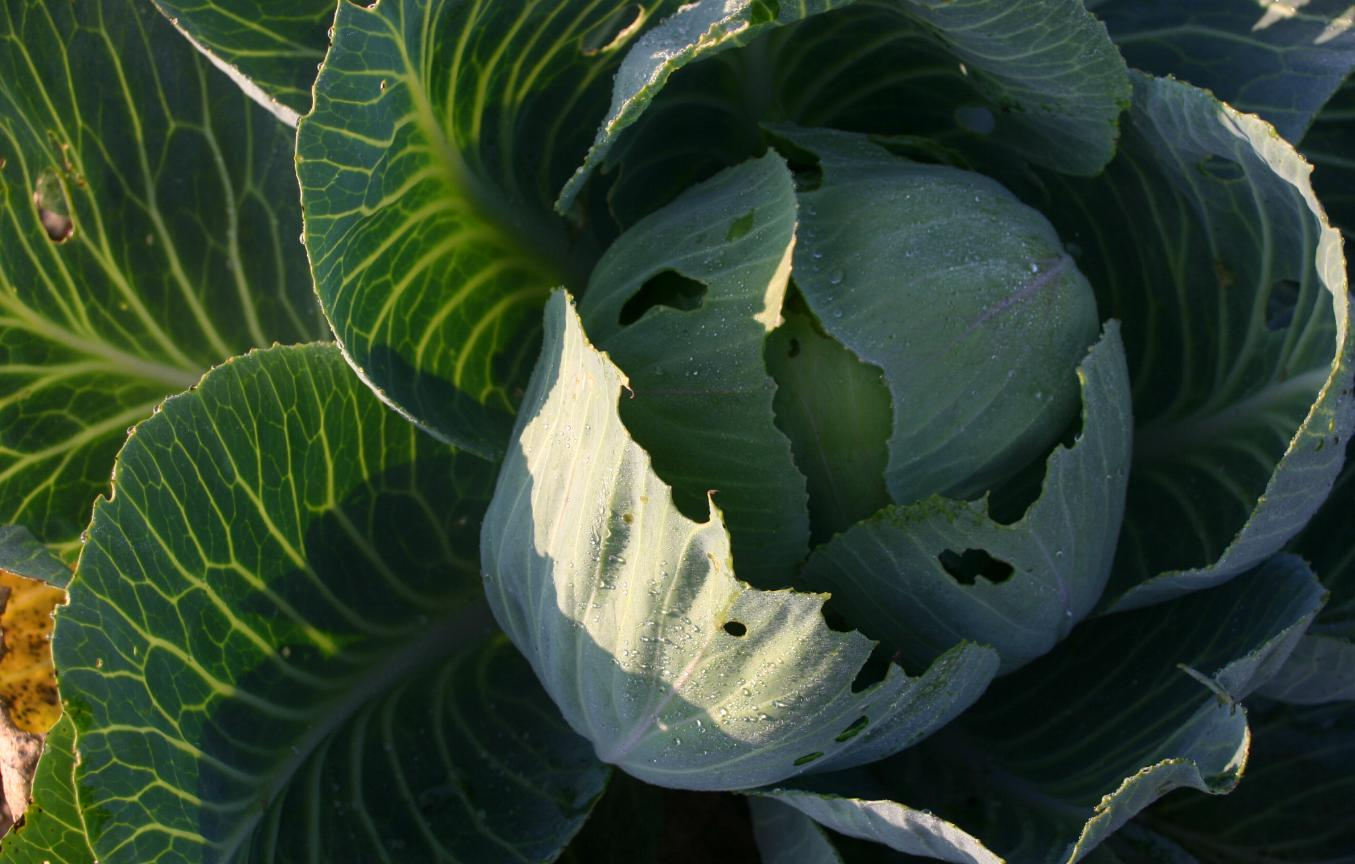 Brassica oleracea var. alba: Total.